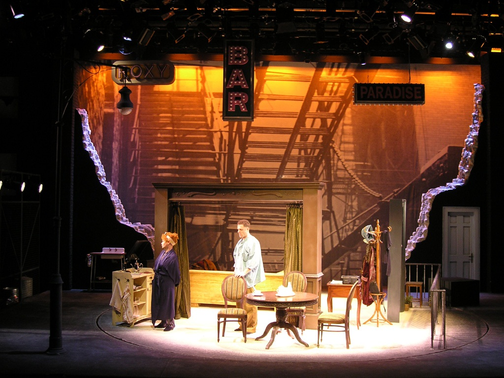 ביבר הזכוכית, במאי מיכה לבינסון, מעצב תפאורה רוני תורן, מעצבת תלבושות עפרה קונפינו, מעצבת תאורה חני ורדי, הקאמרי, 2006